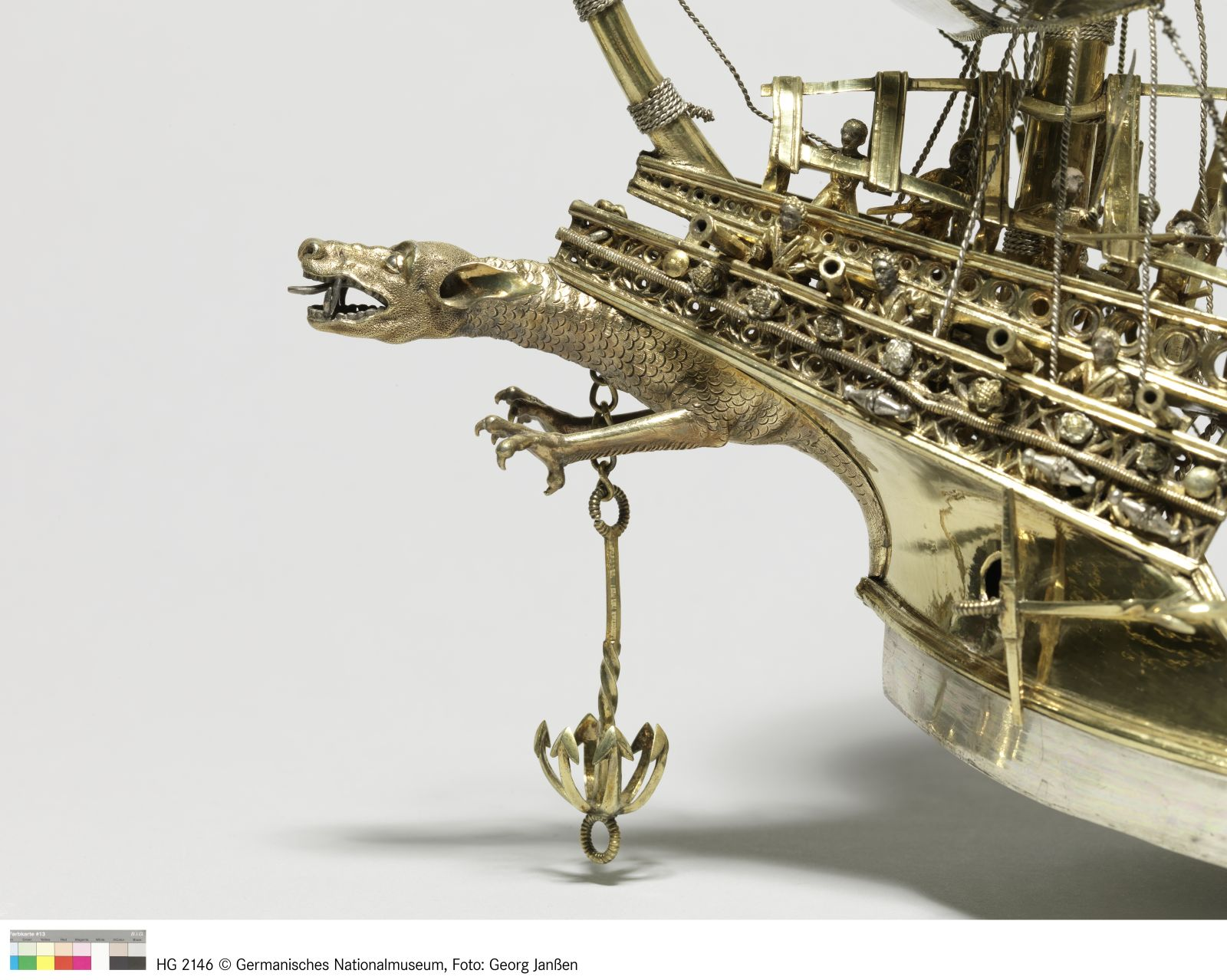 Nef de Schlüsselfeld - dragon avec ancre